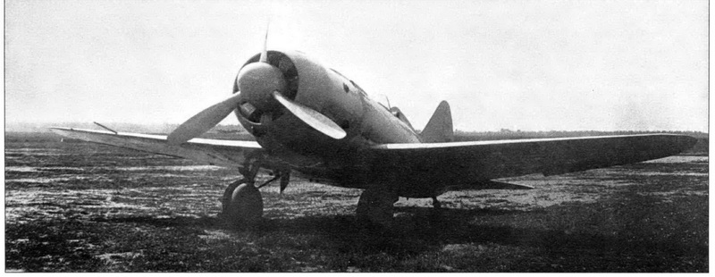 Истребитель И-180-2 во время заводских испытаний в 1939 году.